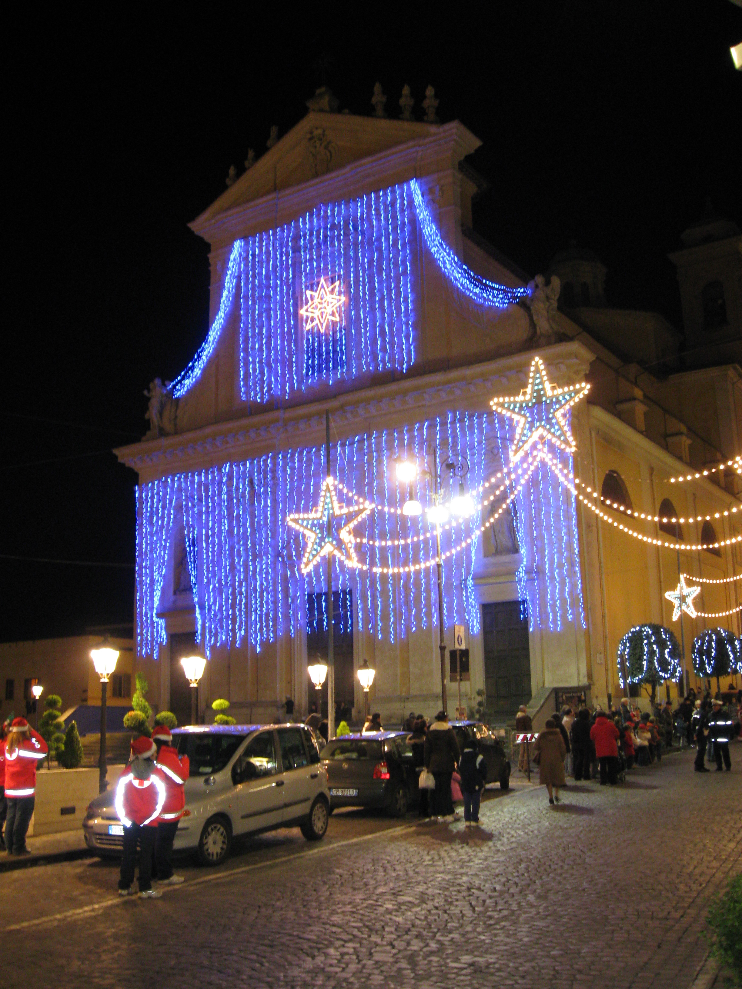 La Basilica di San Barnaba a Marino (RM) addobbata per il Natale 2008